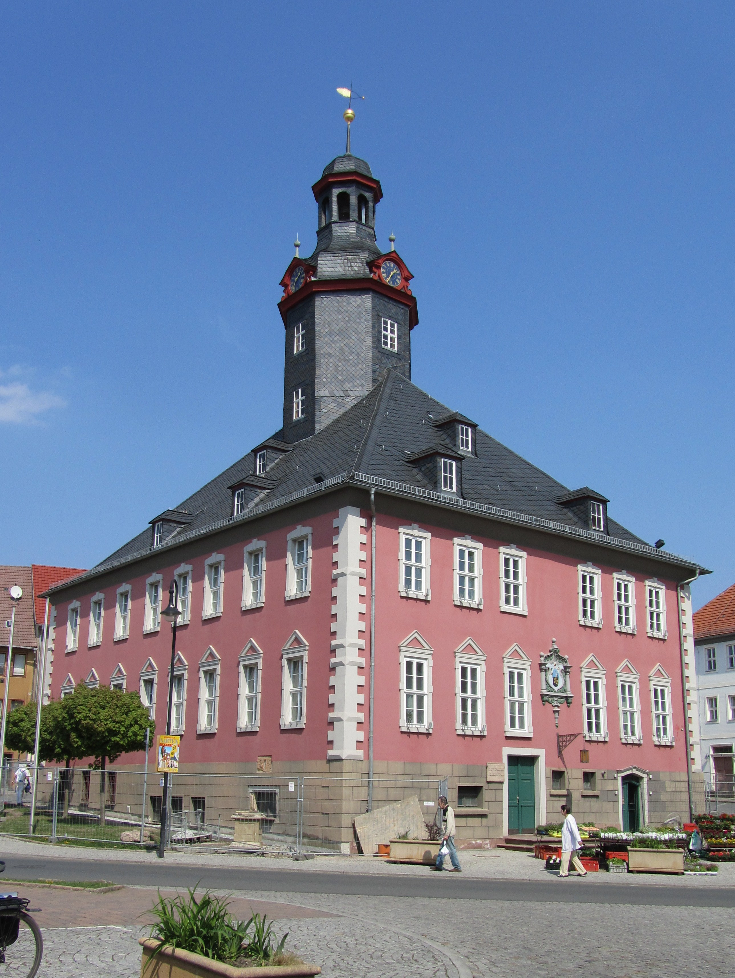 Das Rathaus von Kölleda (Thüringen).